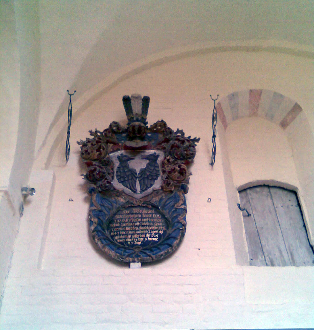 Kirche Schaprode, Wappen